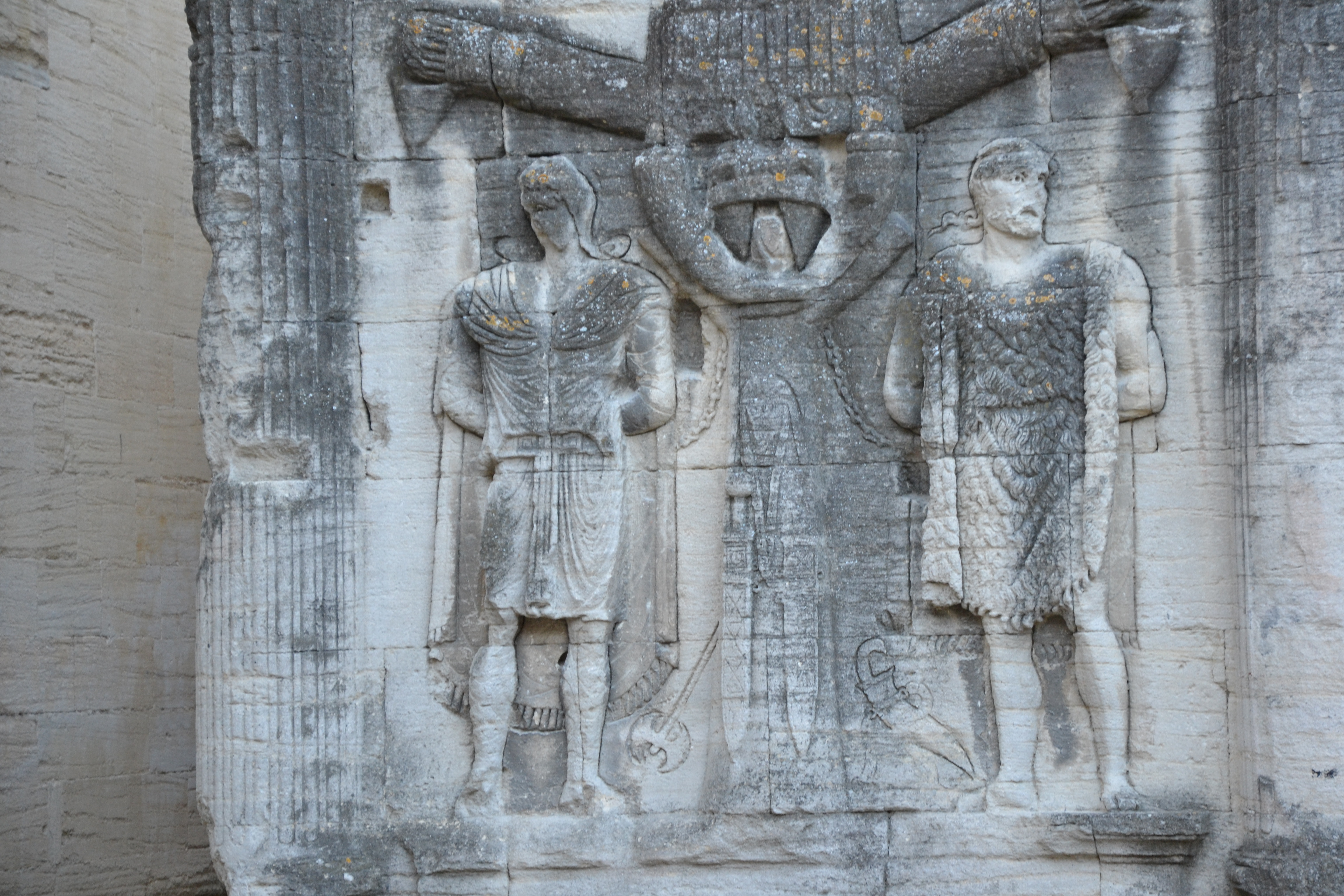 Arc romain de Carpentras dans l'enceinte du Palais de Justice (classement) .